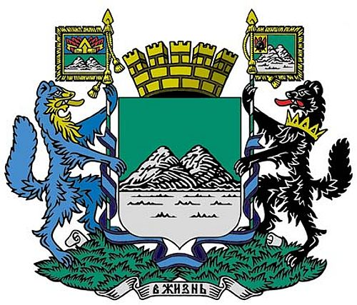 Afbeelding: Wapen vd Russische stad Koergan